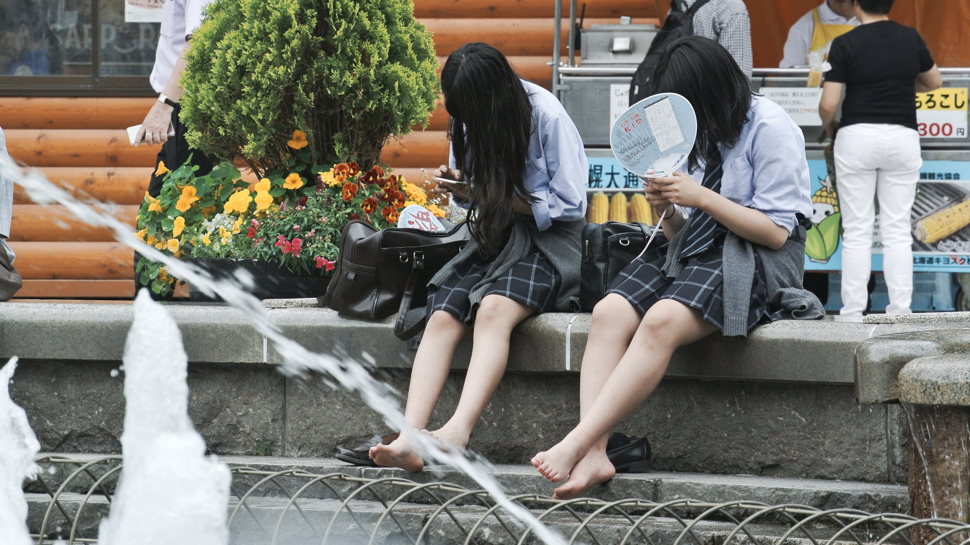 女子高生も噴水で水遊び。 北海道札幌工業高等学校 札工祭うちわ